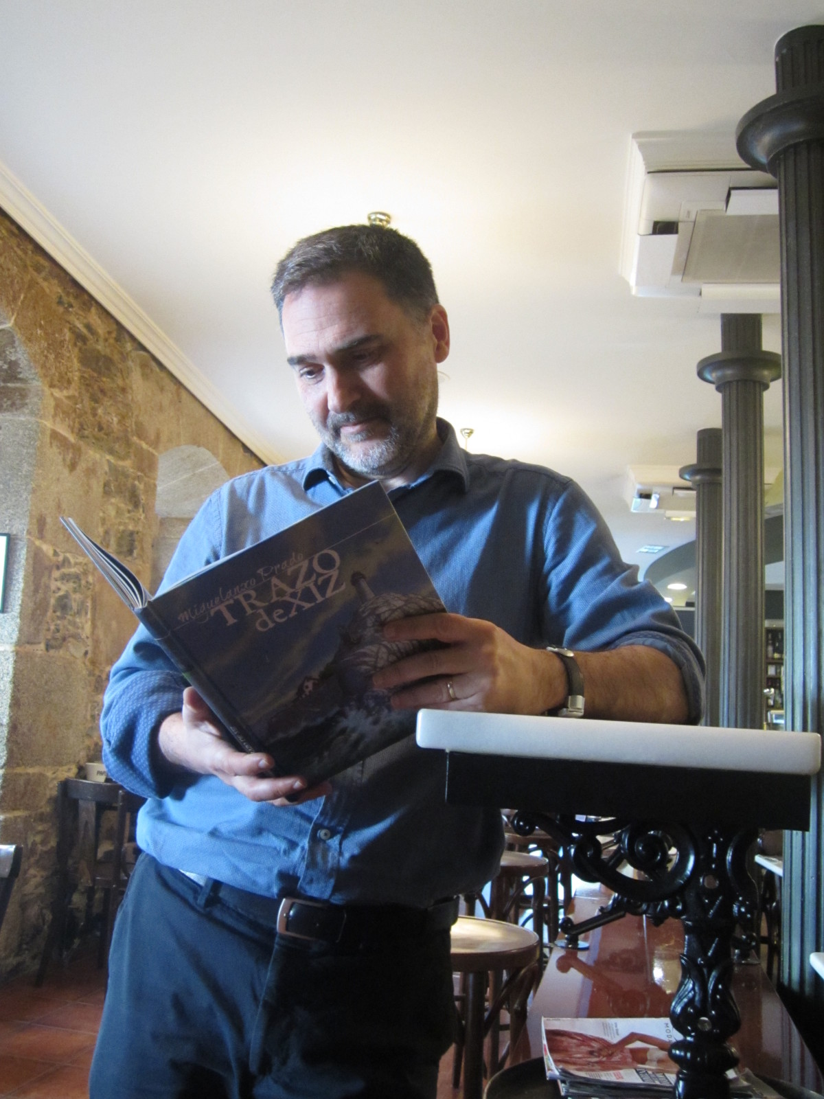 Miguelanxo Prado nunha entrevista no 2012.